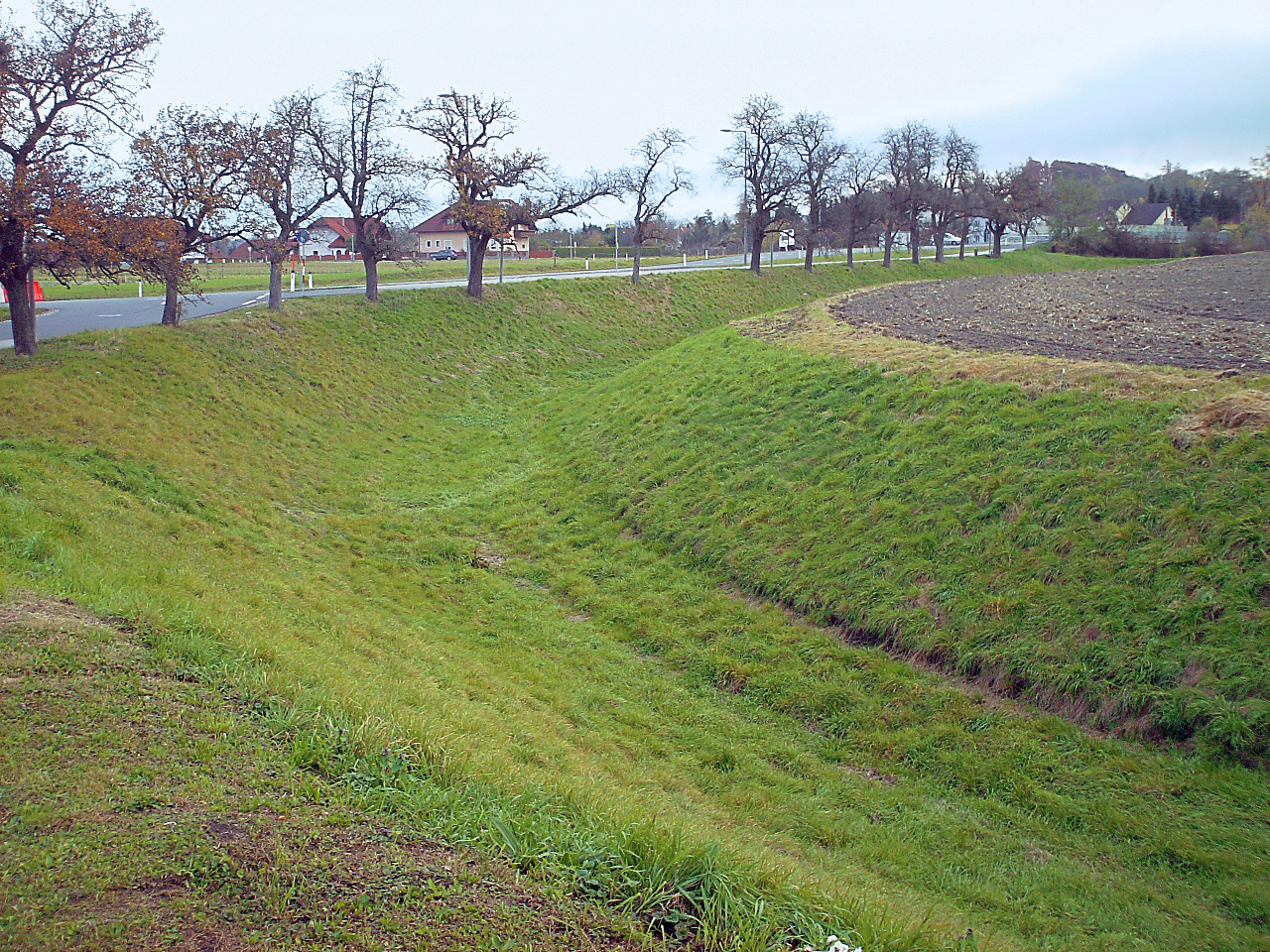 Graben an der NW-Ecke des Legionslagers